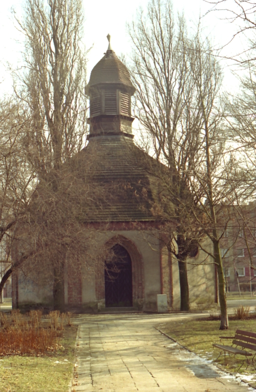 Kaplica szpitalna